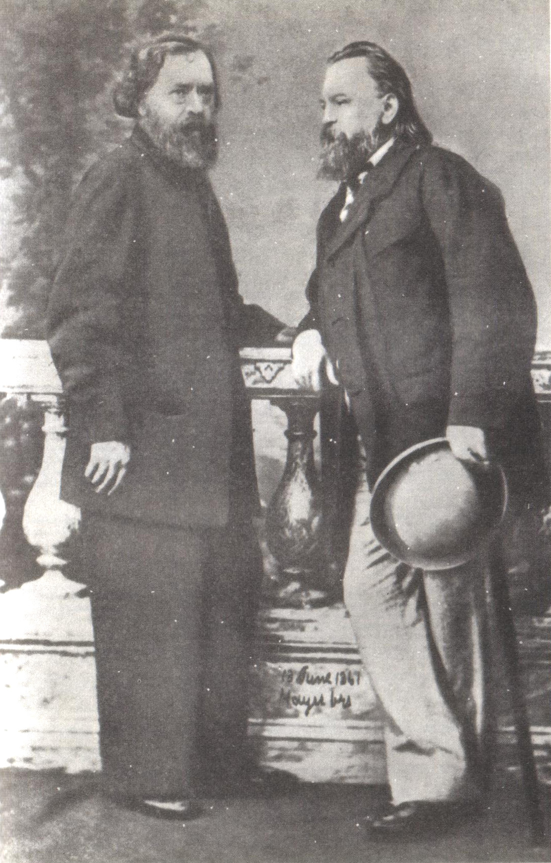 Herzen con Ogarëv.